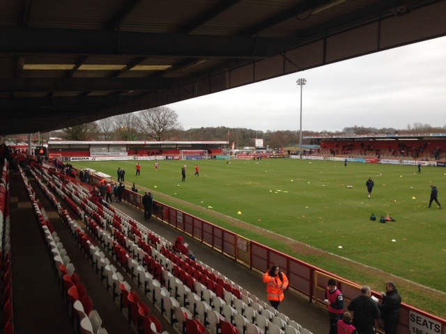 Broadhall Way